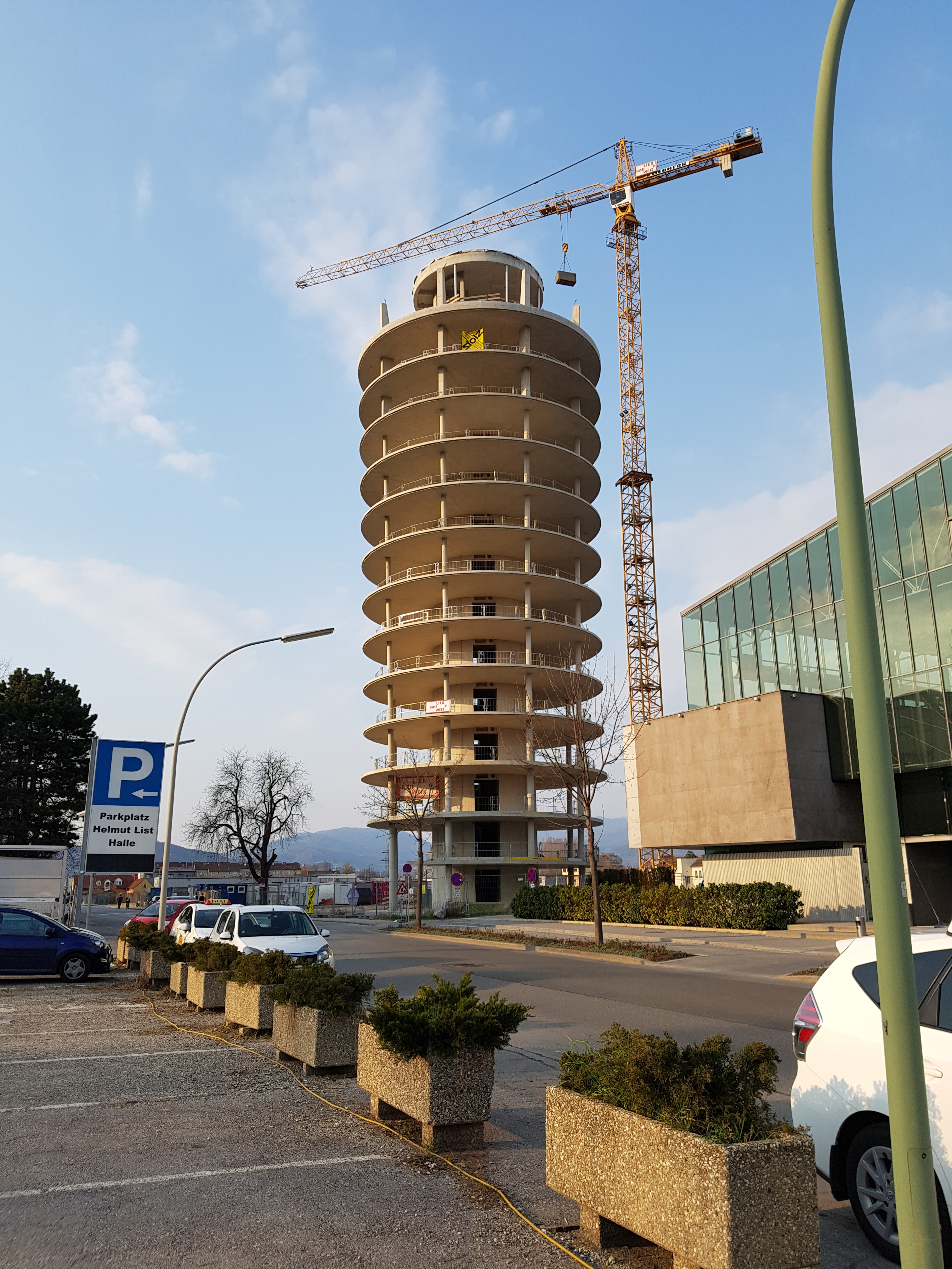 Baufortschritt - Science Tower